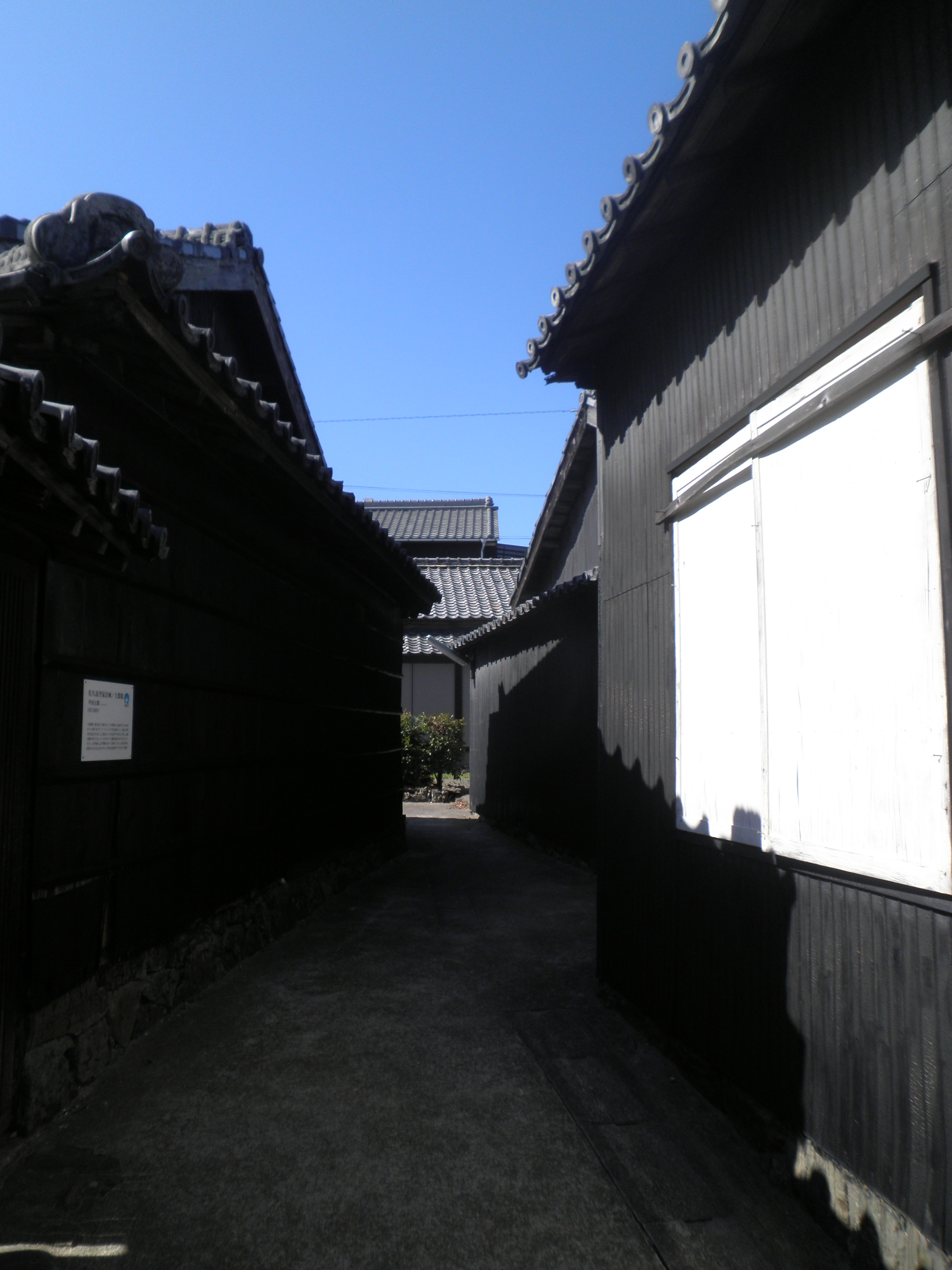 三河湾の黒真珠と呼ばれる佐久島の町並み